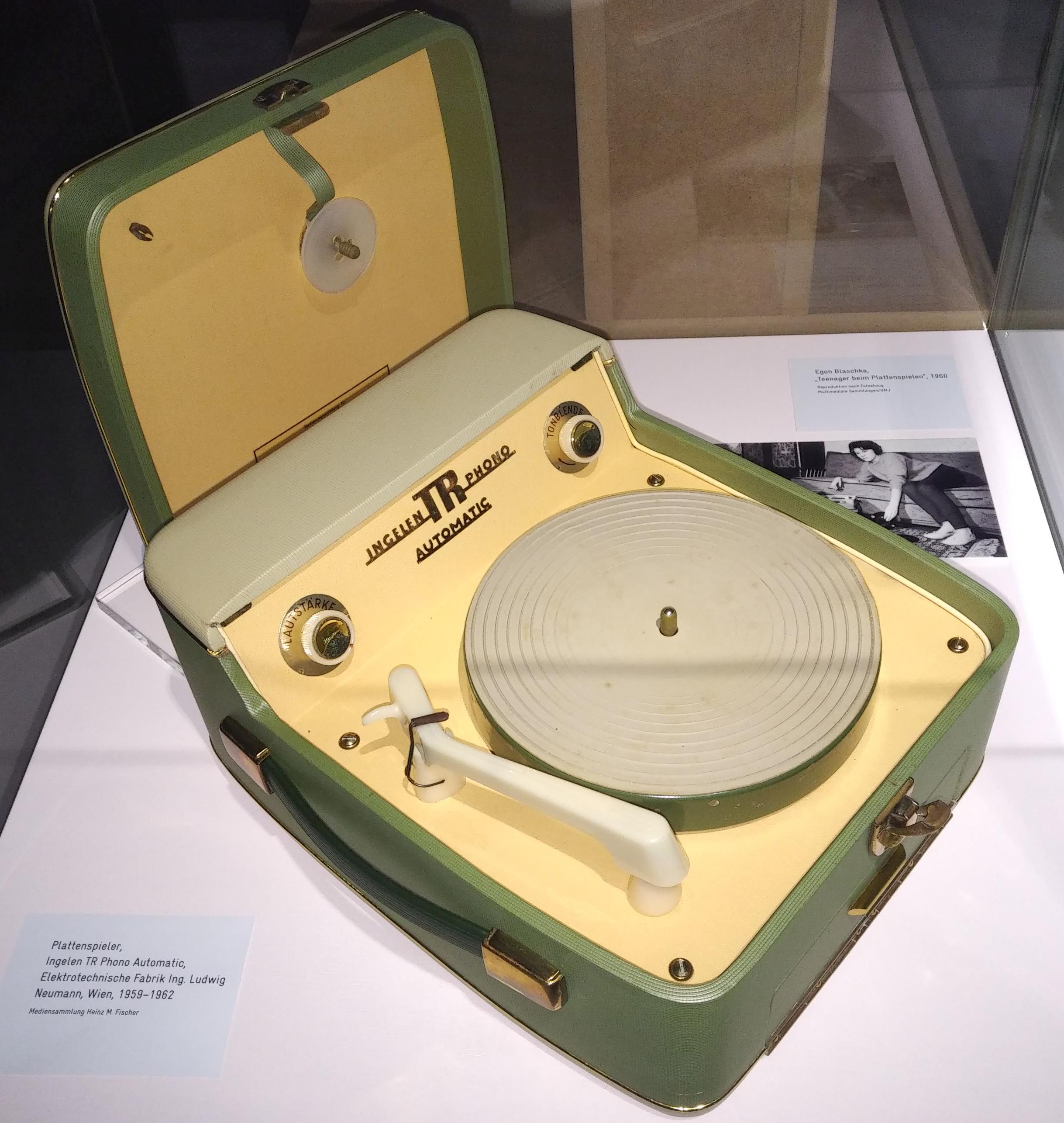 Ingelen TR Phono Automatic, Plattenspieler des österreichischen Produzenten Ingelen